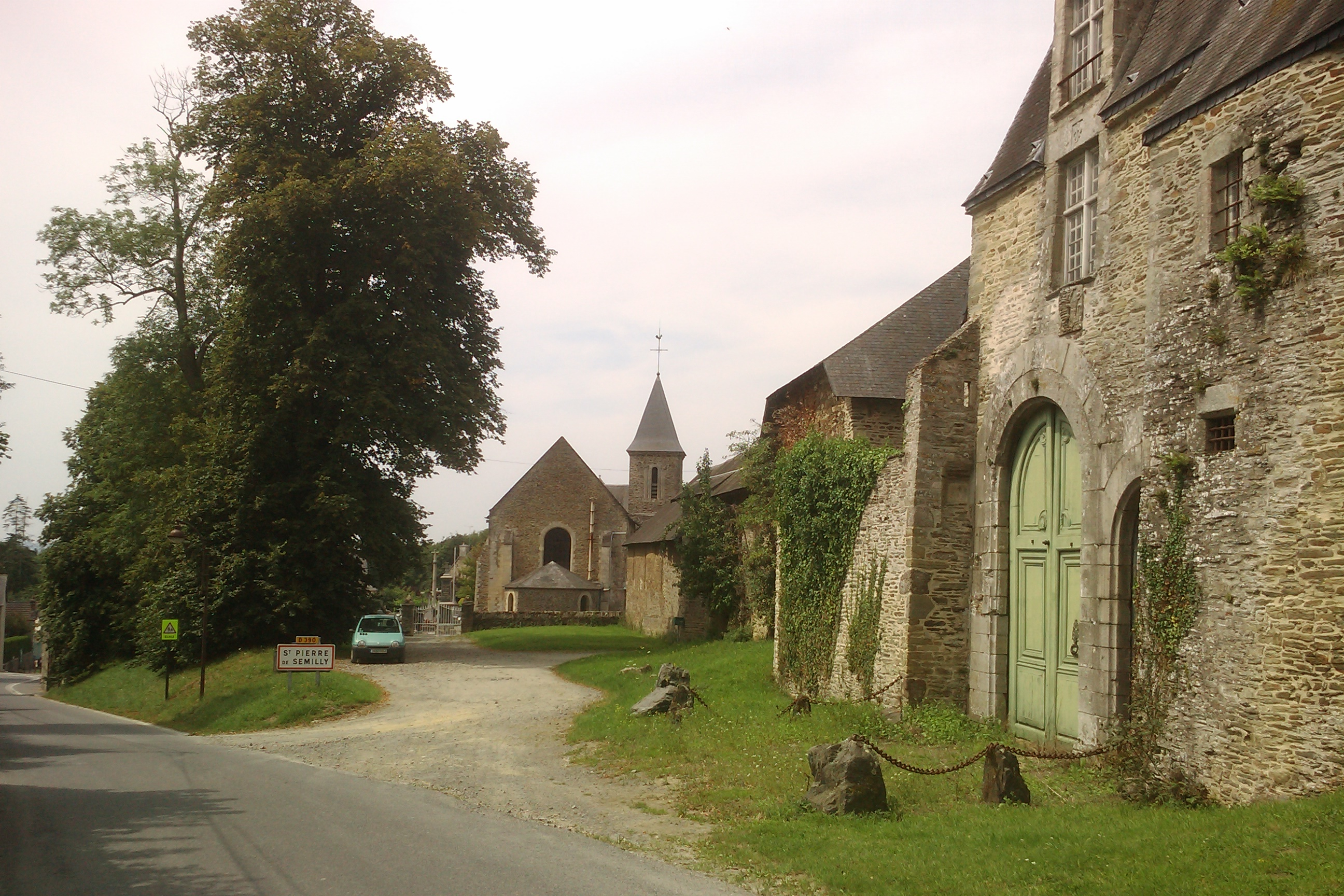 Entrée de Saint-Pierre-de-Semilly, avec le château à droite et l'église en face